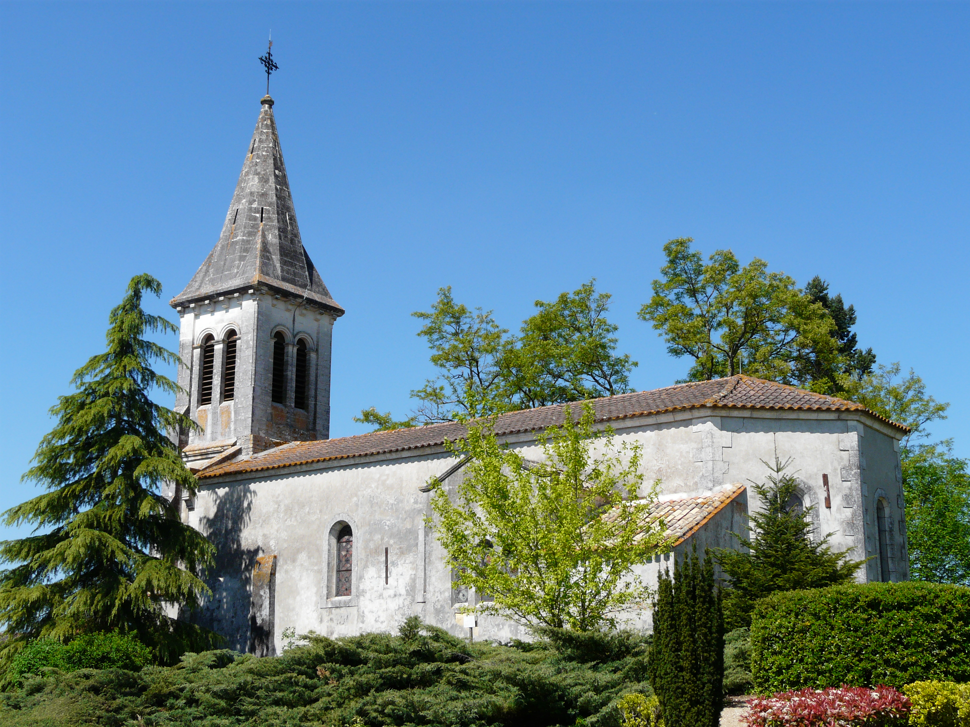 La façade sud-ouest de l'église d'Eygurande, Eygurande-et-Gardedeuil, Dordogne, France.